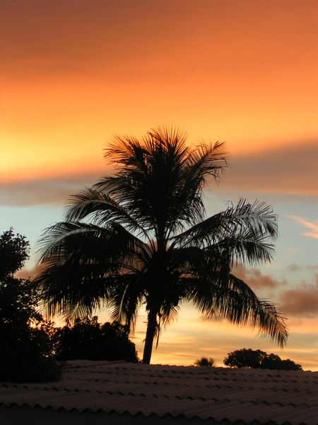 Sonnenuntergang in Santa Clara, Kuba, GNU-FDL, selbstfotografiert